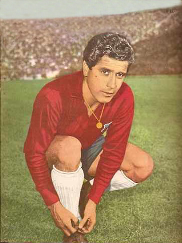 Jaime Ramírez en 1962